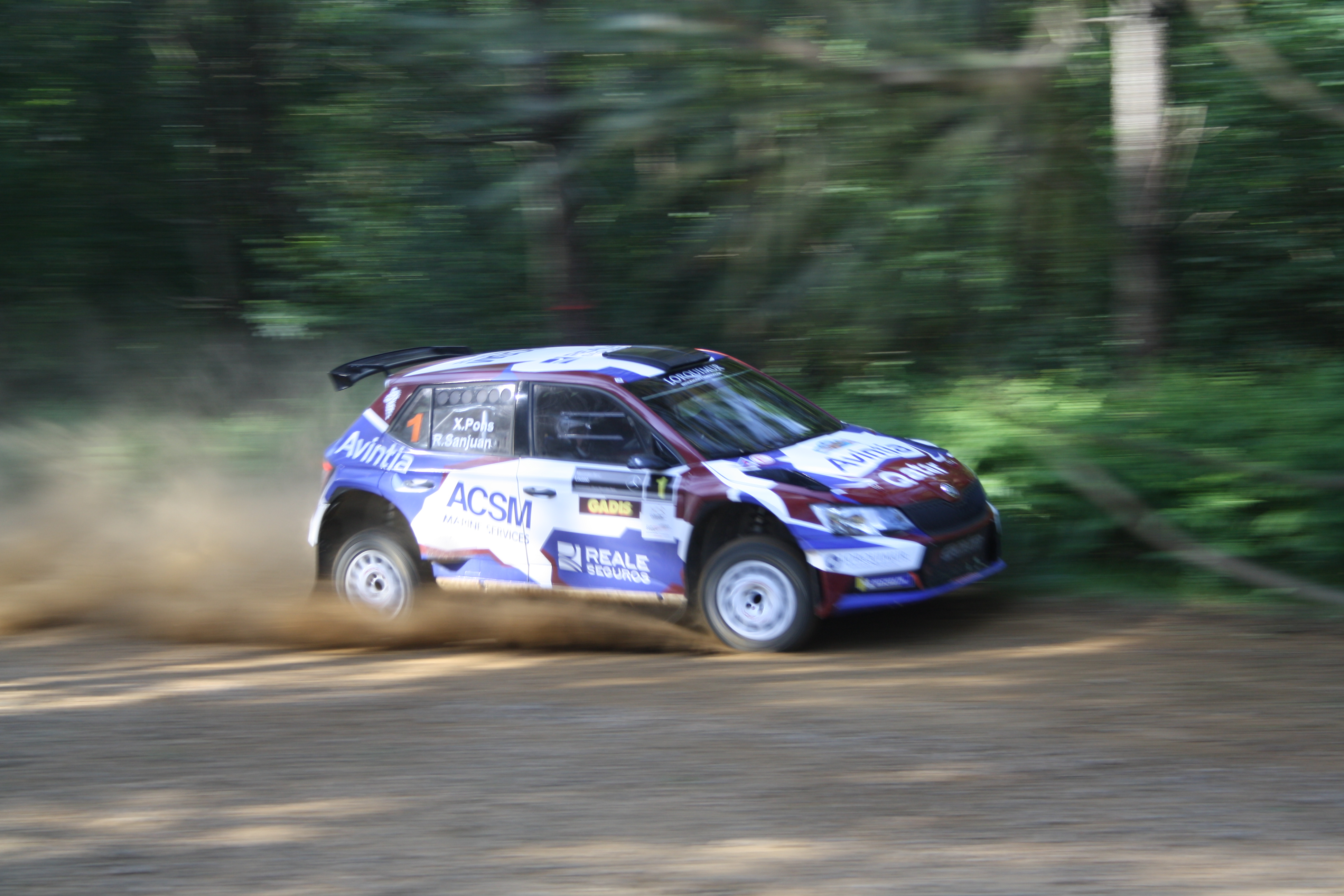 Rally Terra da Auga. Cuarta prueba del campeonato de España de rallies de tierra 2019 y tercera del Súper Campeonato de España de Rally.